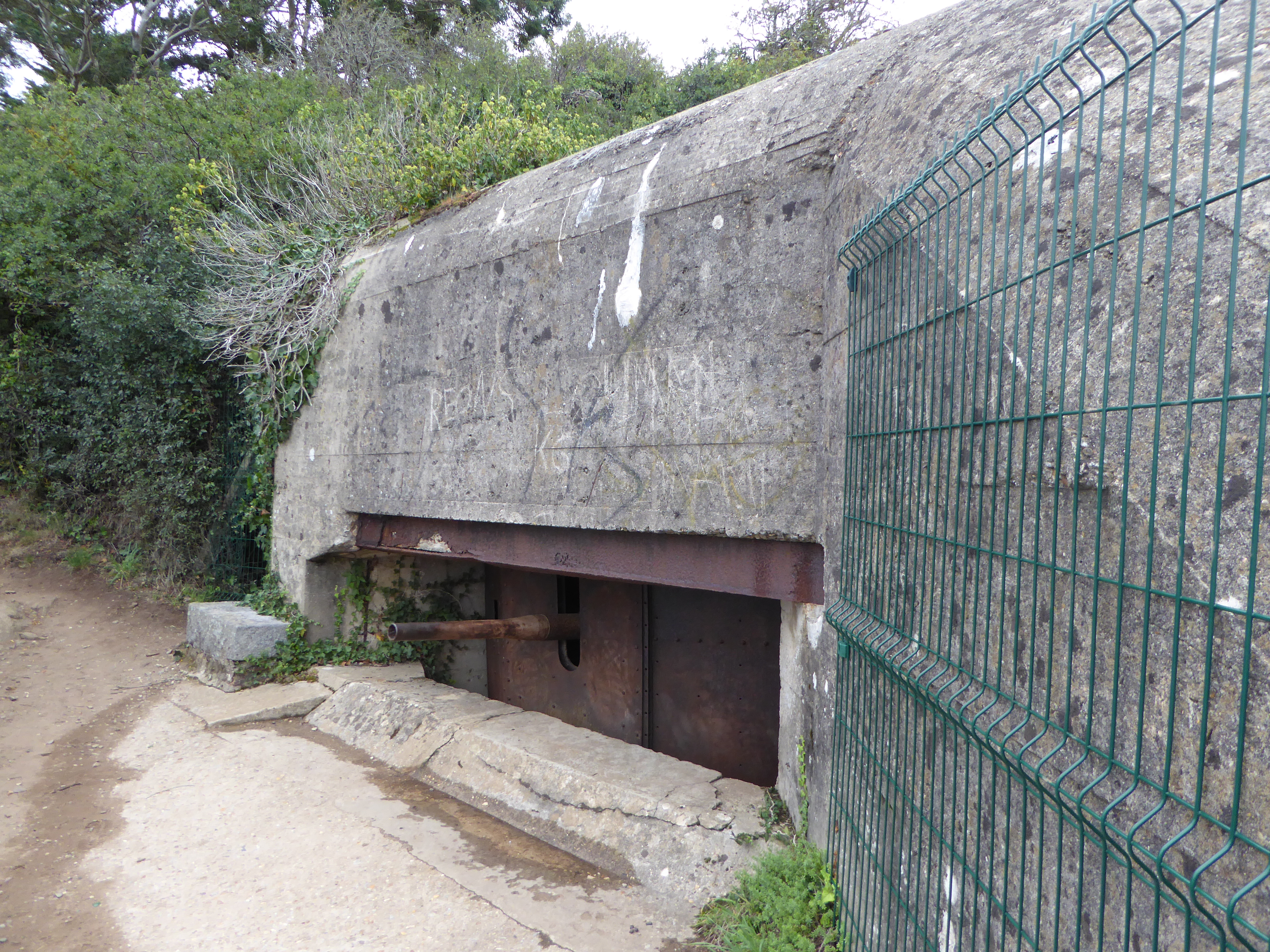 La batterie à Port Mer, Pointe du Grouin 35260 Cancale.- Ille-et-Vilaine